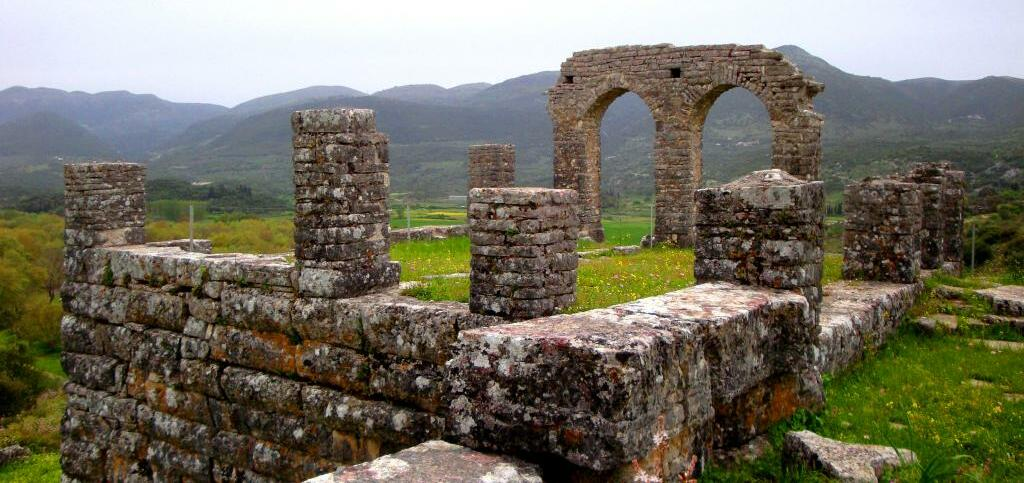 Το Κτίριο με τα τοξωτά ανοίγματα, αρχαία Φανοτή